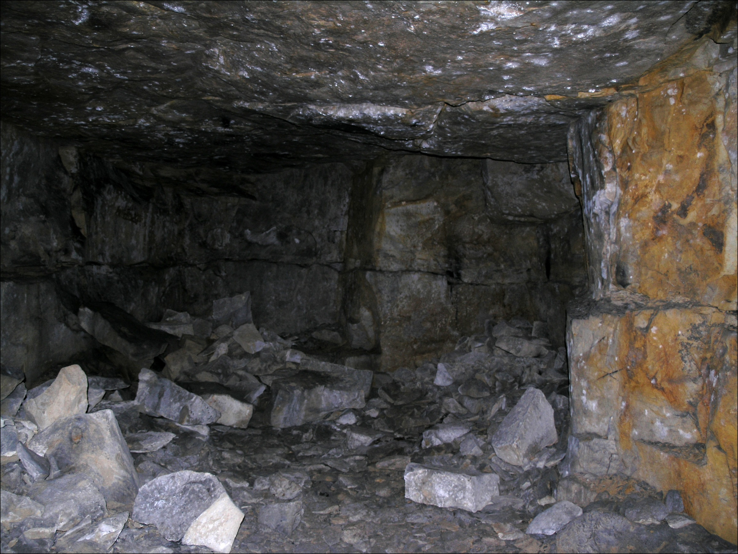 Přírodní památka Vehlovické opuky